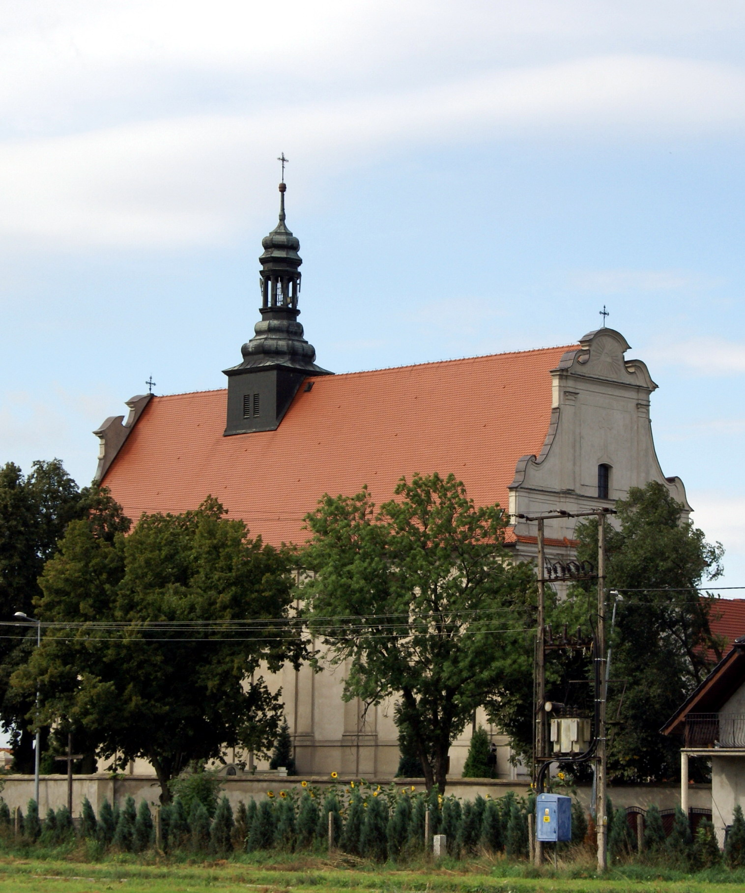 Klasztor franciszkanów w Miejskiej Górce.